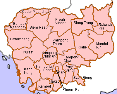 Les provinces du Cambodge Illustration personnelle libre de droits à partir d'une image de Wikimedia Commons (CambodiaKampongCham.png)